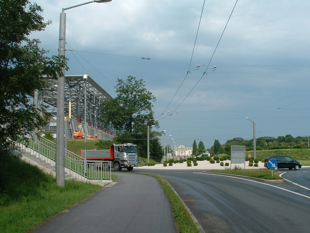 Stadion and Schloss Klessheim, Salzburg Photograph by Gakuro 2006